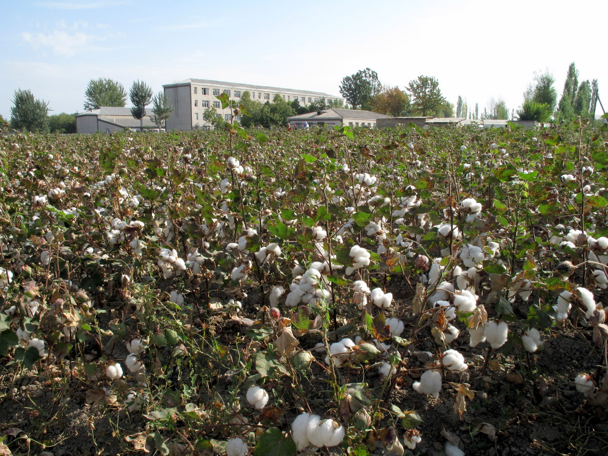 Cotton Fields